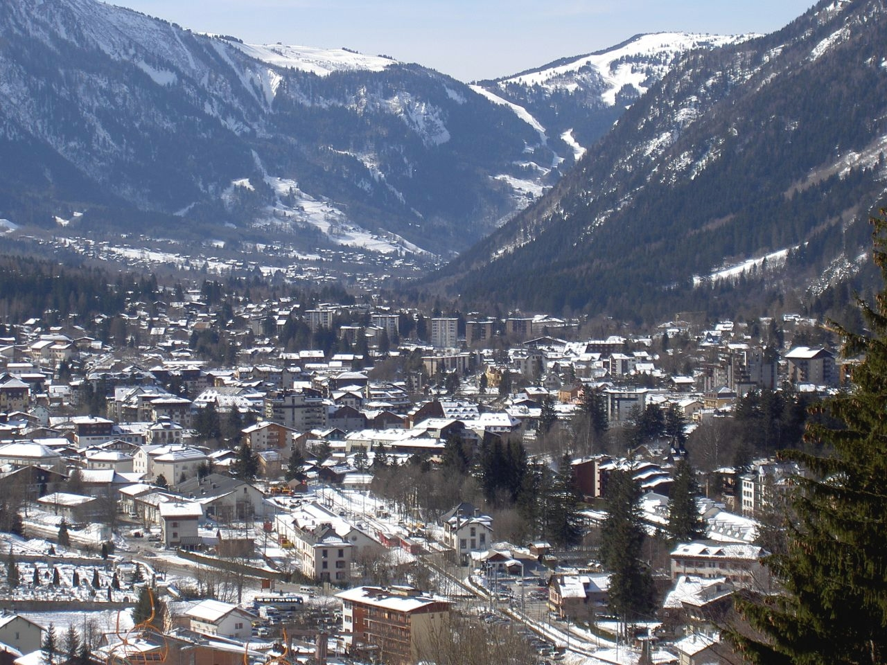 Vue de la vallée de Chamonix Valley